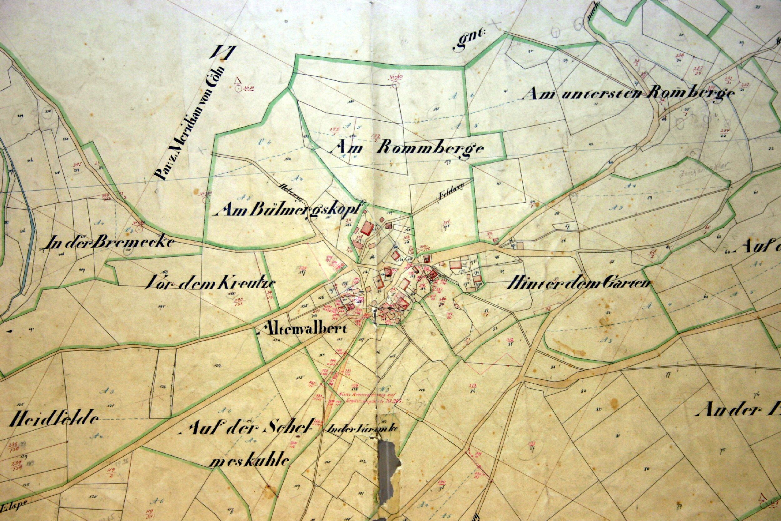 Ausschnitt aus dem Urkataster, Gemarkung Elspe, Flur 7 - Altenvalbert